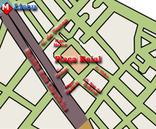 Karte: Lage der Plaça Reial in Barcelona